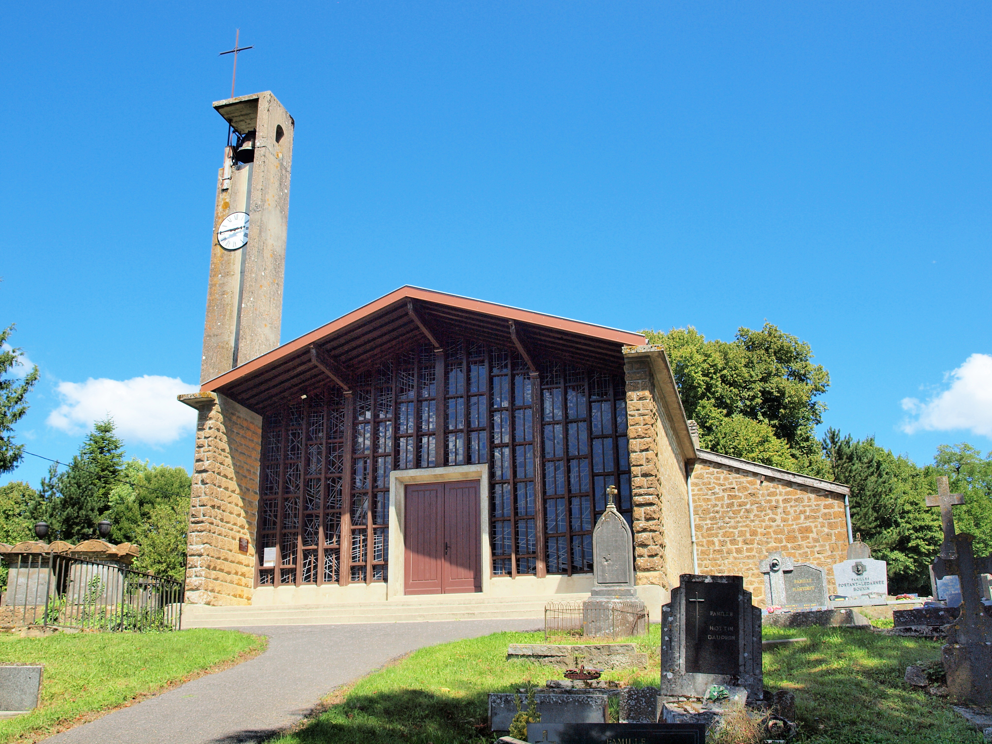 Église Notre-Dame de Montgon (Ardennes, France)